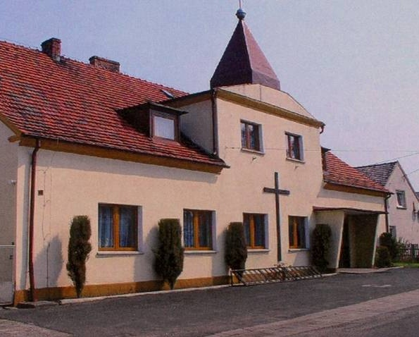 Kościół św. Floriana w Spóroku